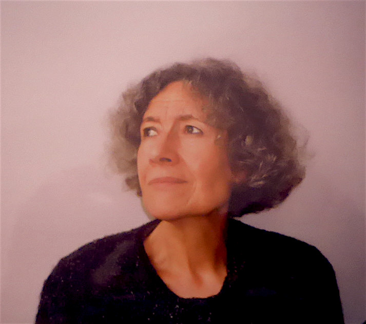 photographie reprsentant l'écrivain Jocelyne François